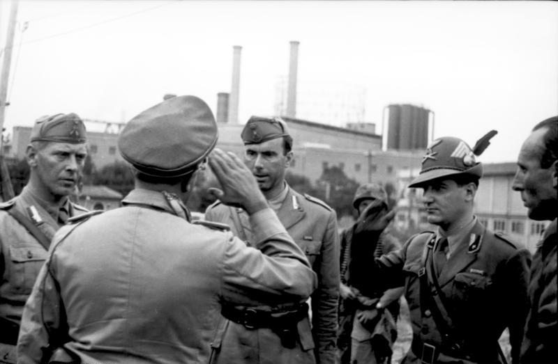 Title: Italien, italienische Kriegsgefangene Extra information: Italien.- Gefangennahme italienischer Offiziere durch deutsche Fallschirmjäger in einer Stadt (im Hintergrund Fabrikgebäude), Gespräch mit deutschen Offizieren; PK 699 Additional information: *